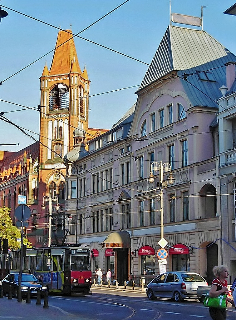 Widok z ul. Jagiellońskiej na kamienicę i wieżę Poczty Głównej w Bydgoszczy